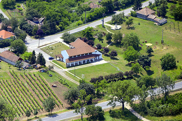 Légi fotó Szegi